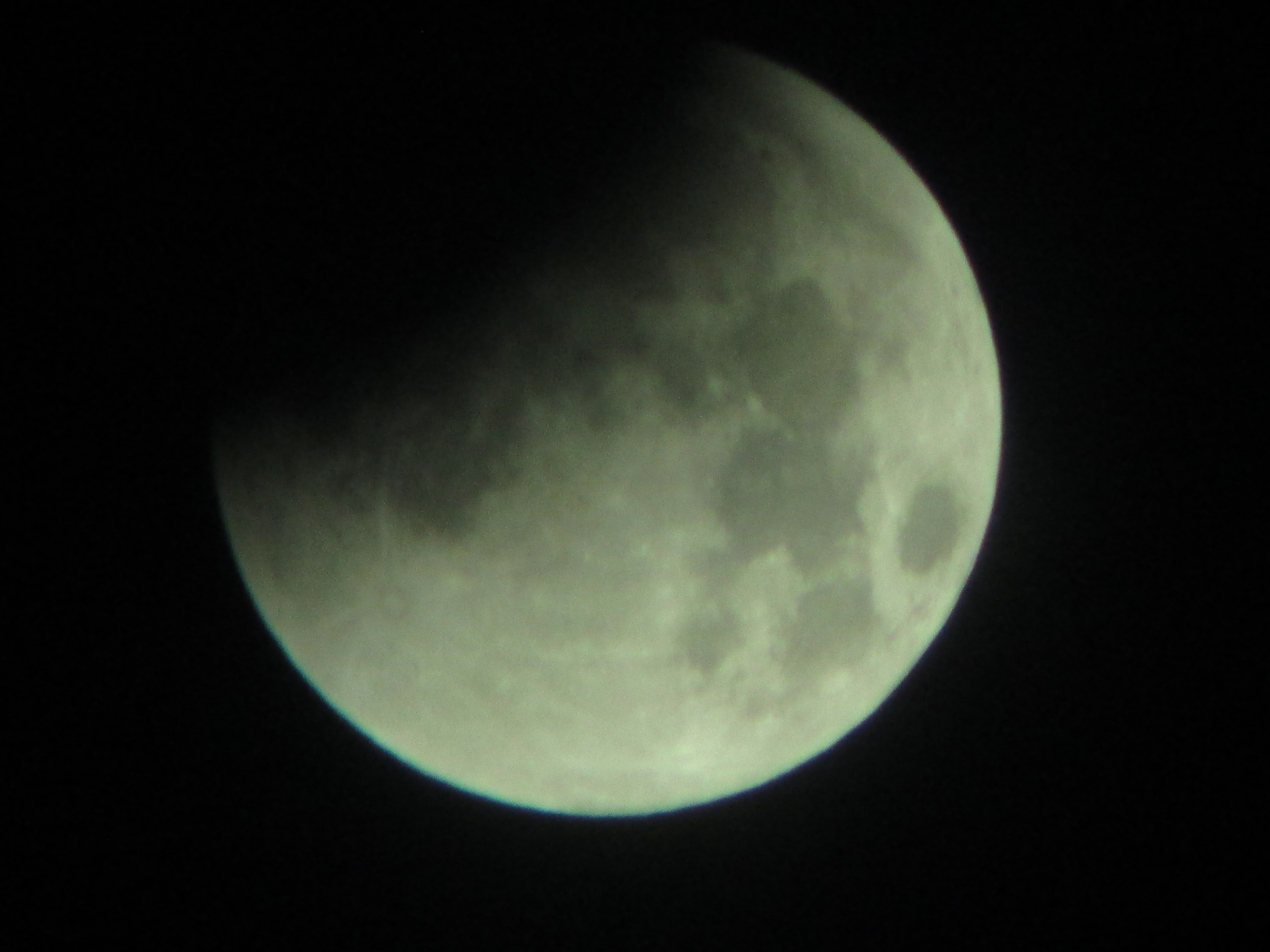 Photographie de l'éclipse totale de Lune du 28 septembre 2015, prise en Vendée à l'aide d'un APN accouplé à une jumelle.